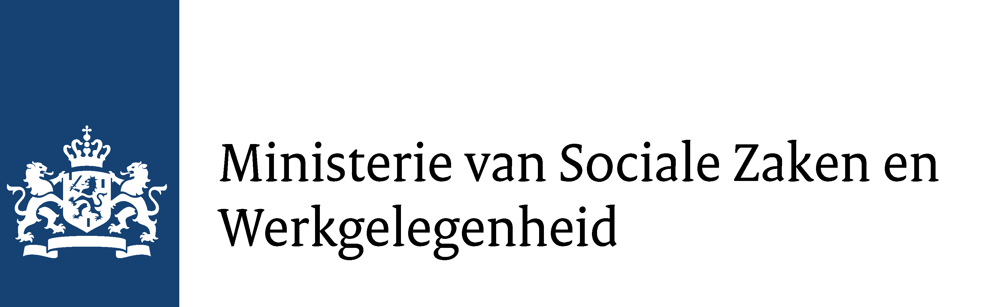 Het officiële logo van het Ministerie van Sociale Zaken en Werkgelegenheid